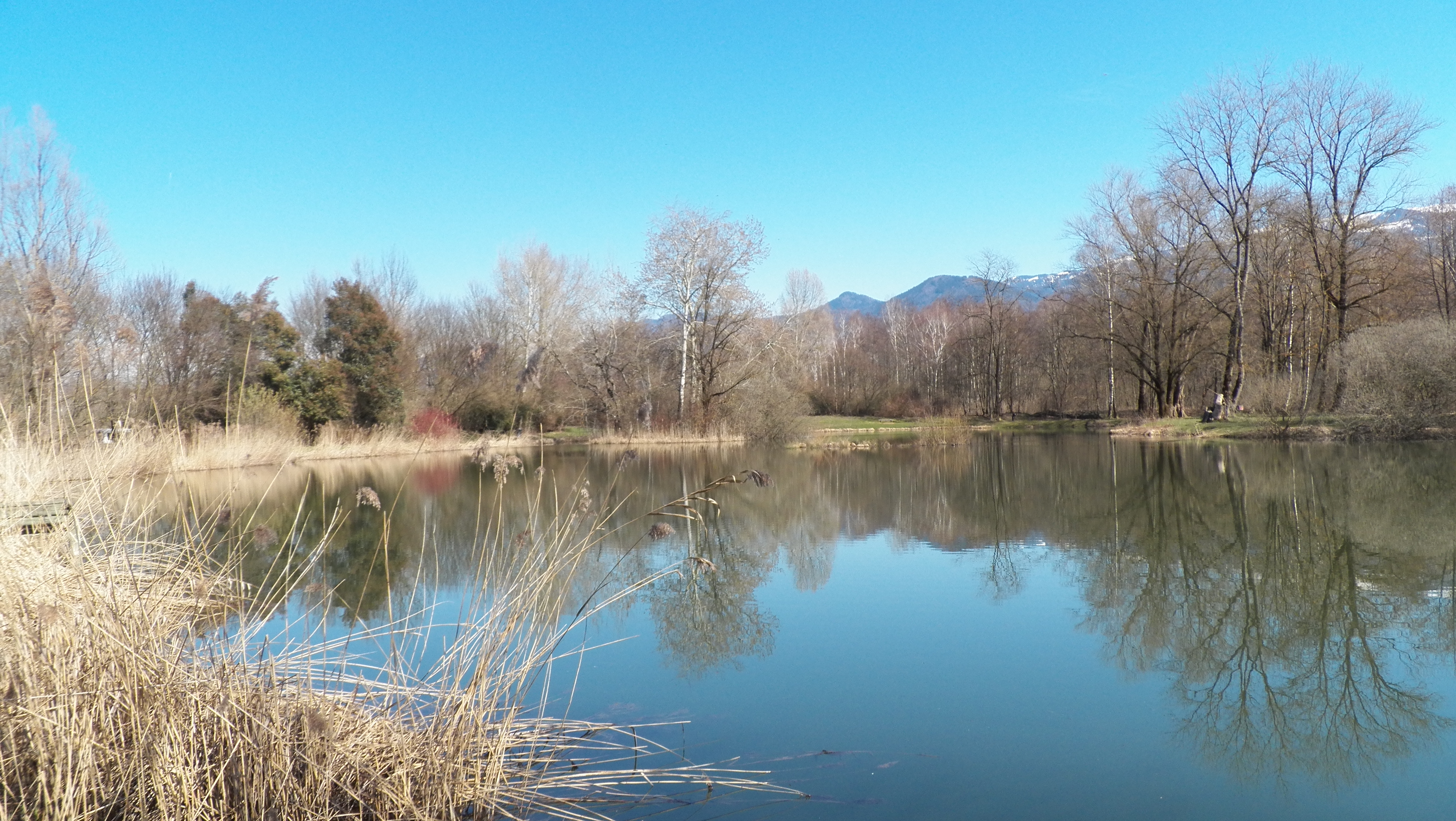 Etang du marais de Montfort